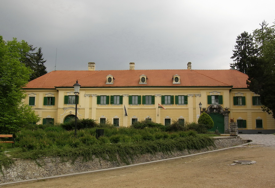 v. Draskovich-kastély (Sellye, Köztársaság tér 7.) This is a photo of a monument in Hungary. Identifier: 1910